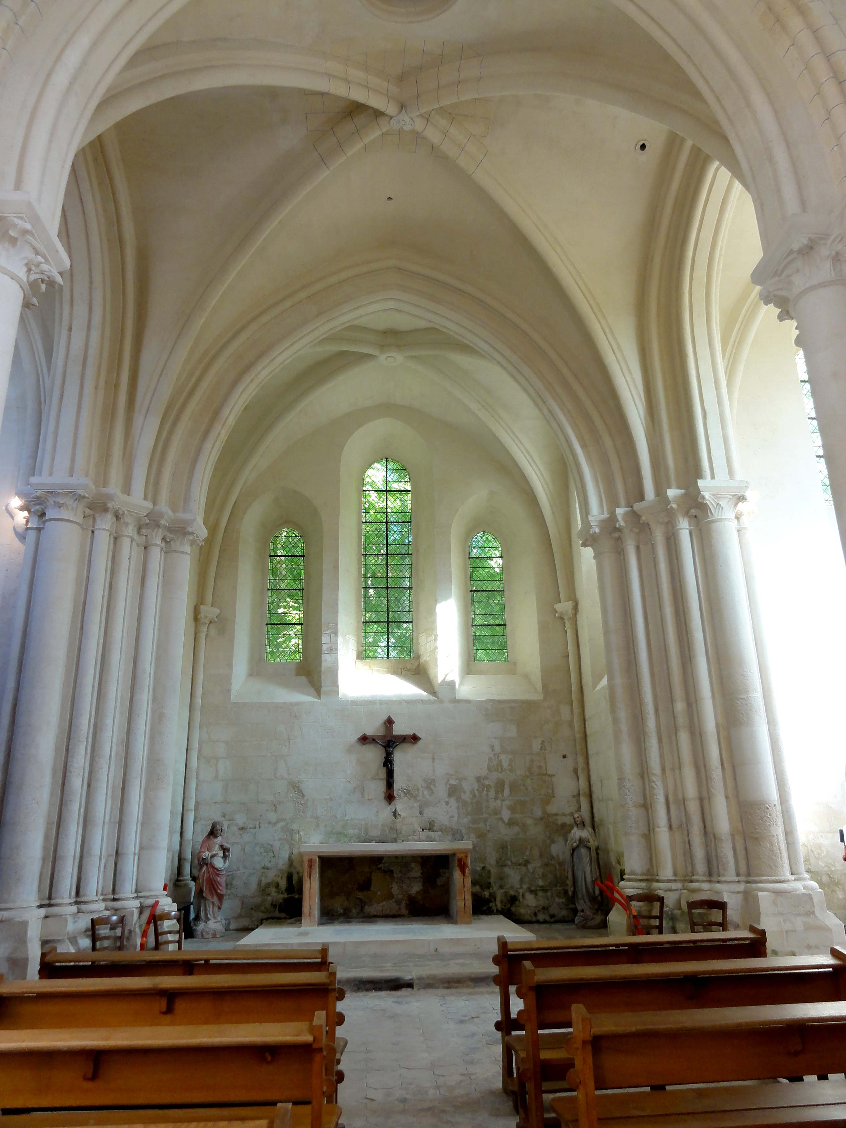 Intérieur de l'église - voir titre.